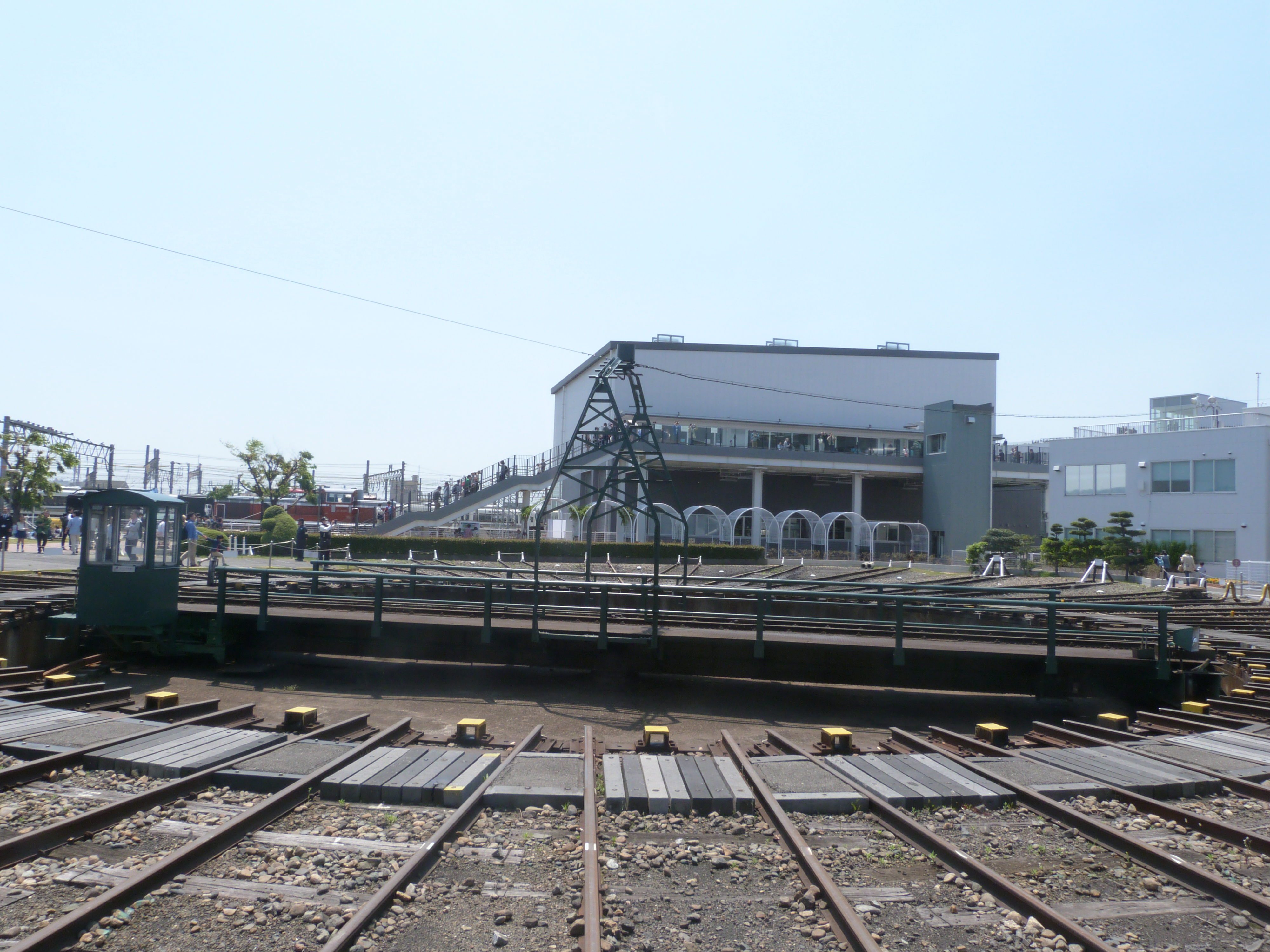 京都鉄道博物館内扇形車庫の転車台。